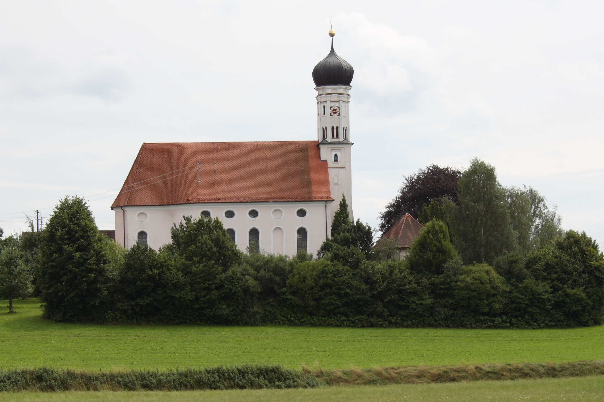 Katholische Pfarrkirche St. Stephan in Häder, einem Ortsteil von Dinkelscherben im Landkreis Augsburg (Bayern), Blick von Neuhäder